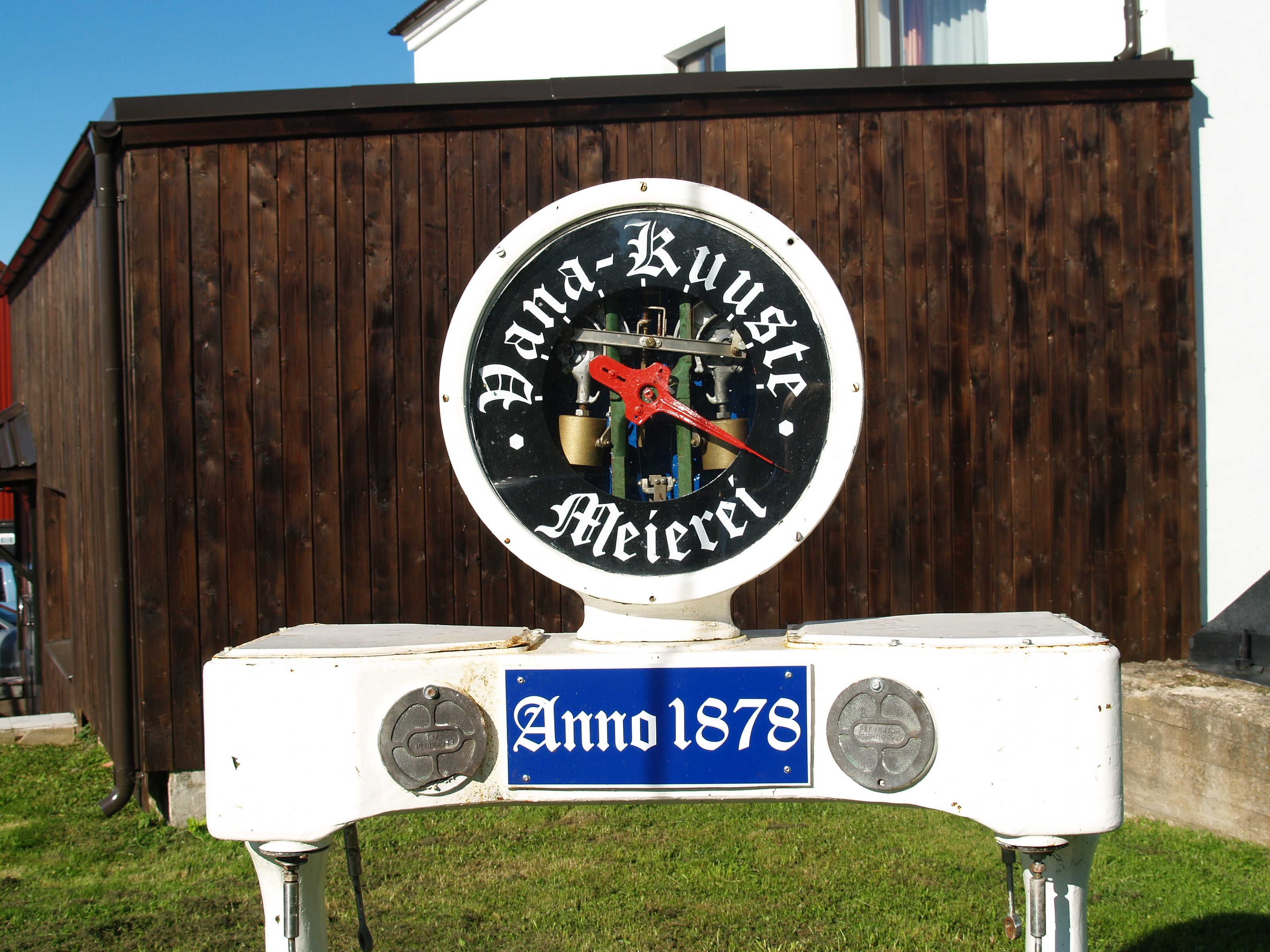 Eesti esimene koorelahutajaga meierei asutati 1878 Vana-Kuuste mõisas.